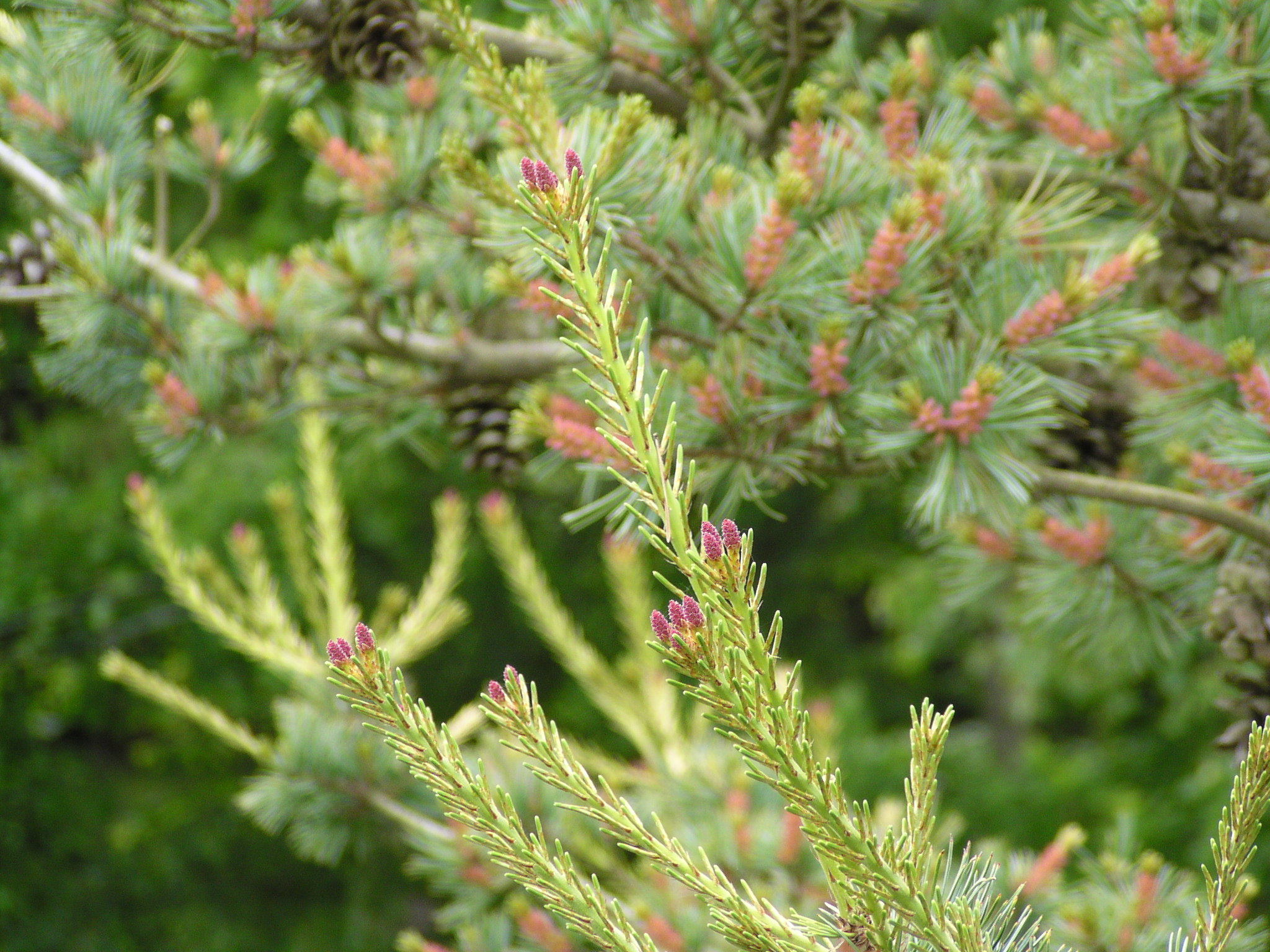 kvetoucí borovice drobnokvětá (Pinus parviflora)